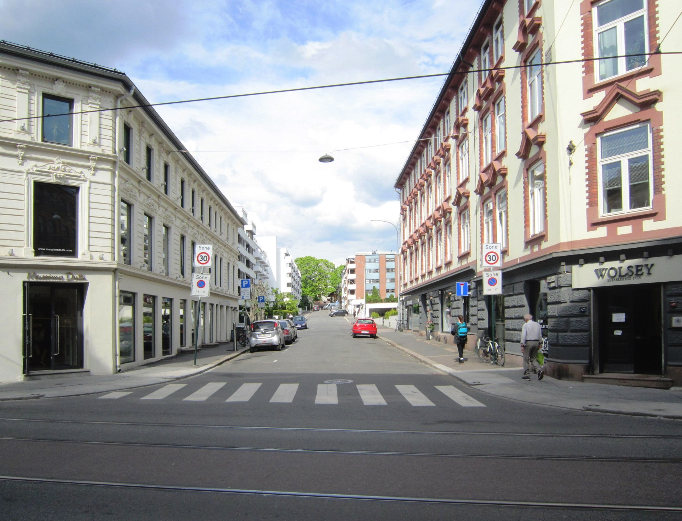 Grønnegata i Oslo sett fra Hegdehaugsveien